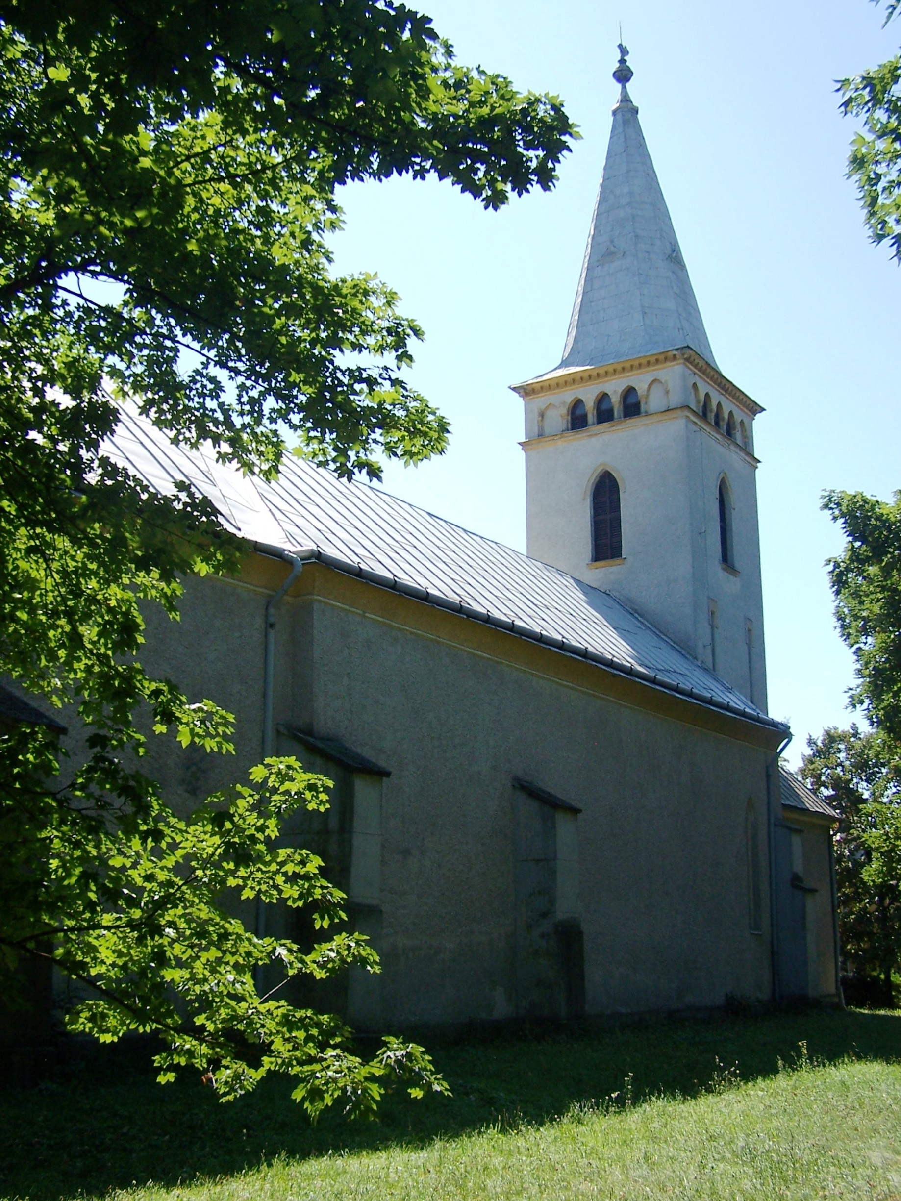 Ref. templom (Sajóvámos, Kossuth tér) This is a photo of a monument in Hungary. Identifier: 3079